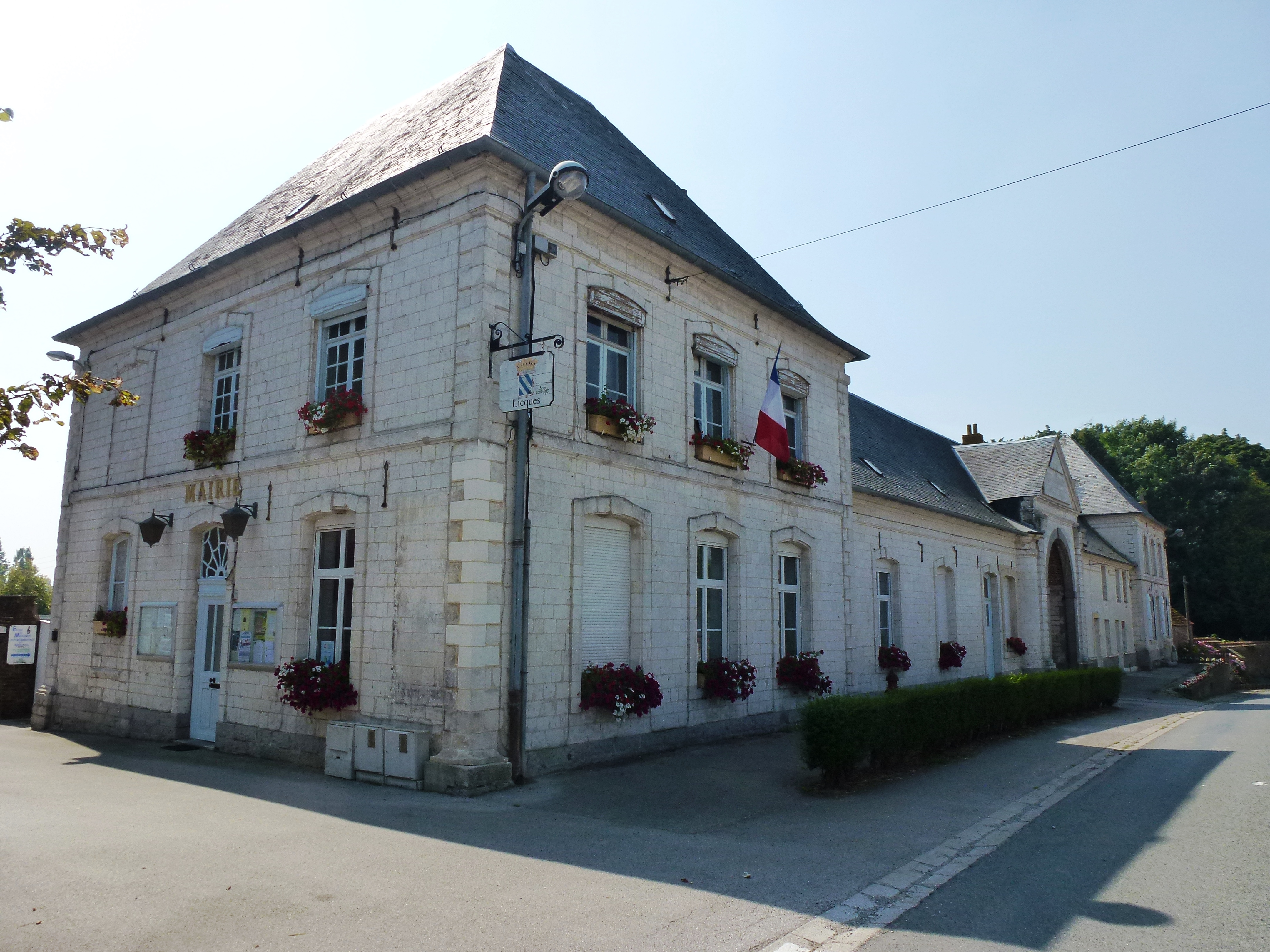 Abbaye des Prémontrés de Licques (ClasséInscrit) .